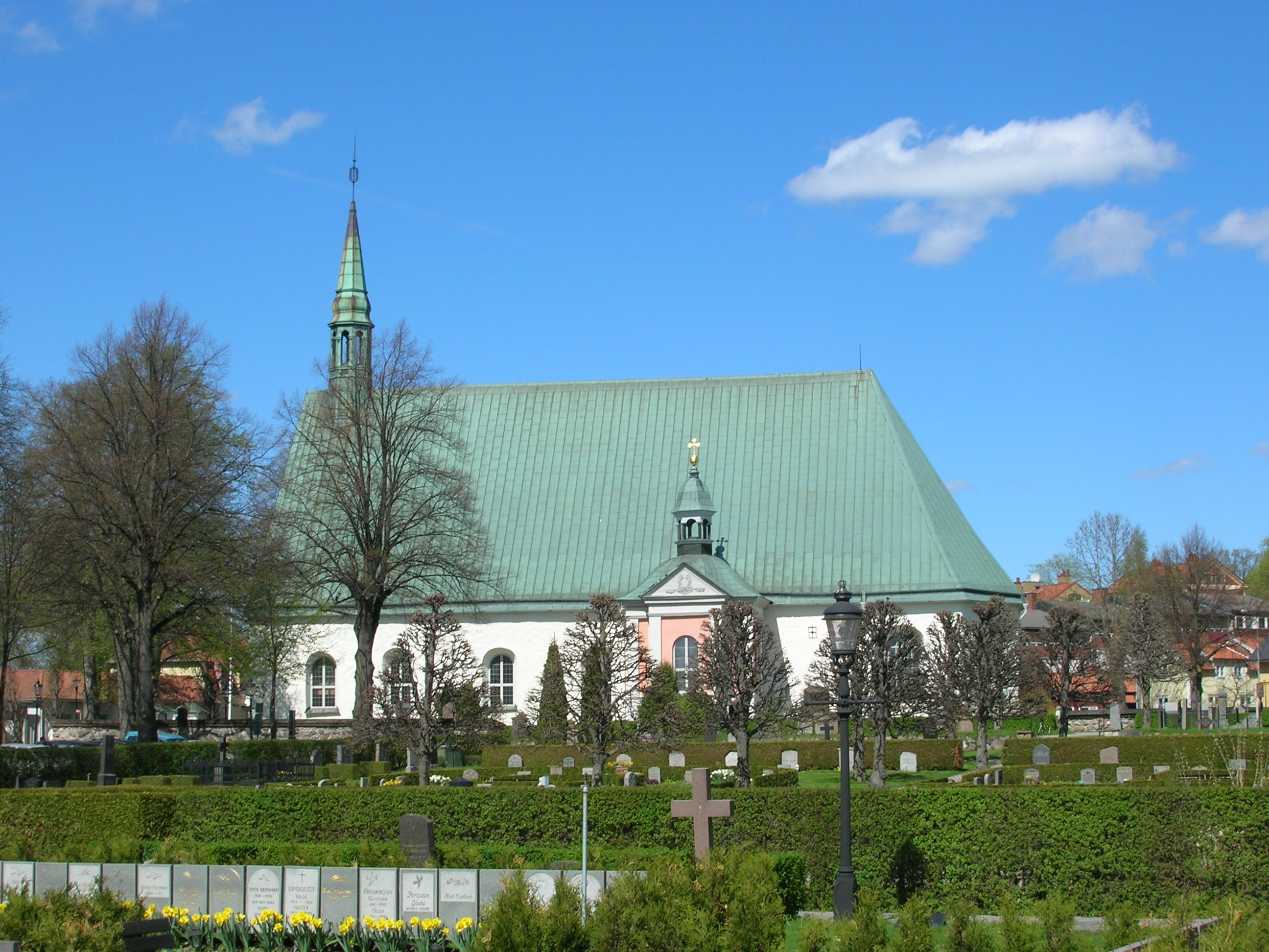 Alla Helgona Kyrka i Nyköping 13 maj 2006 Fotograf: Niklas Nordblad